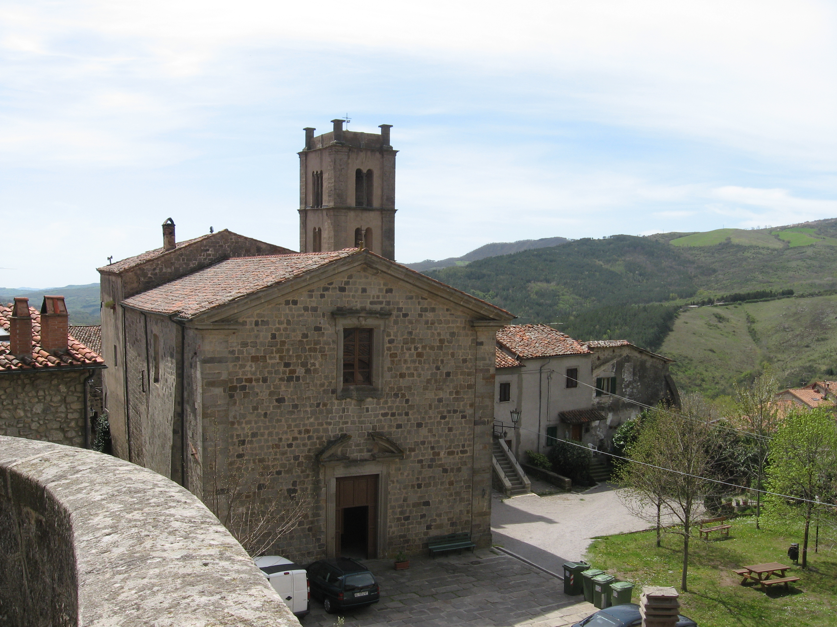 La Pieve di Santa Fiora batch Wikimangia 2008 source date 19-20 aprile 2008 author Senpai